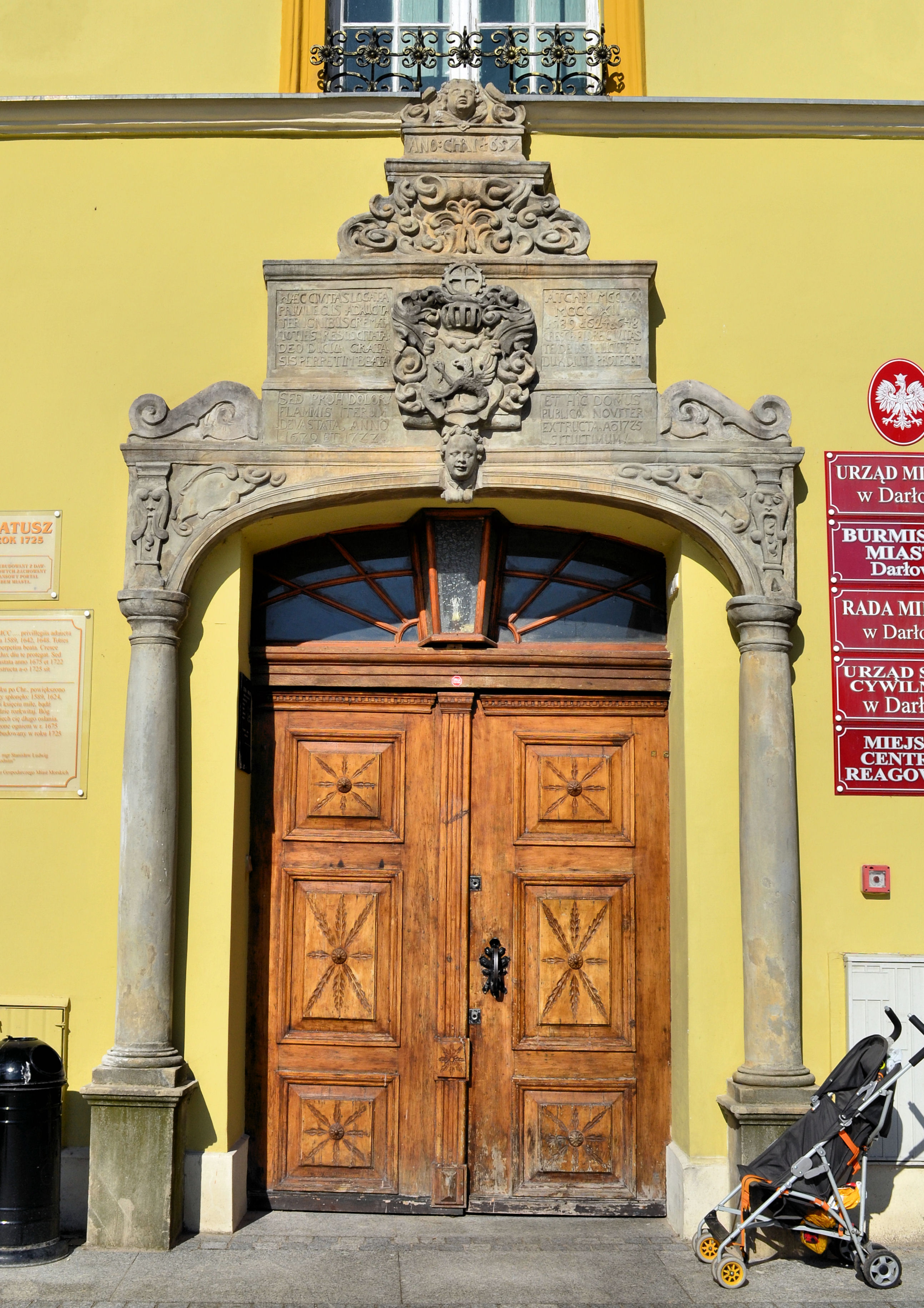 Portal ratusza w Darłowie